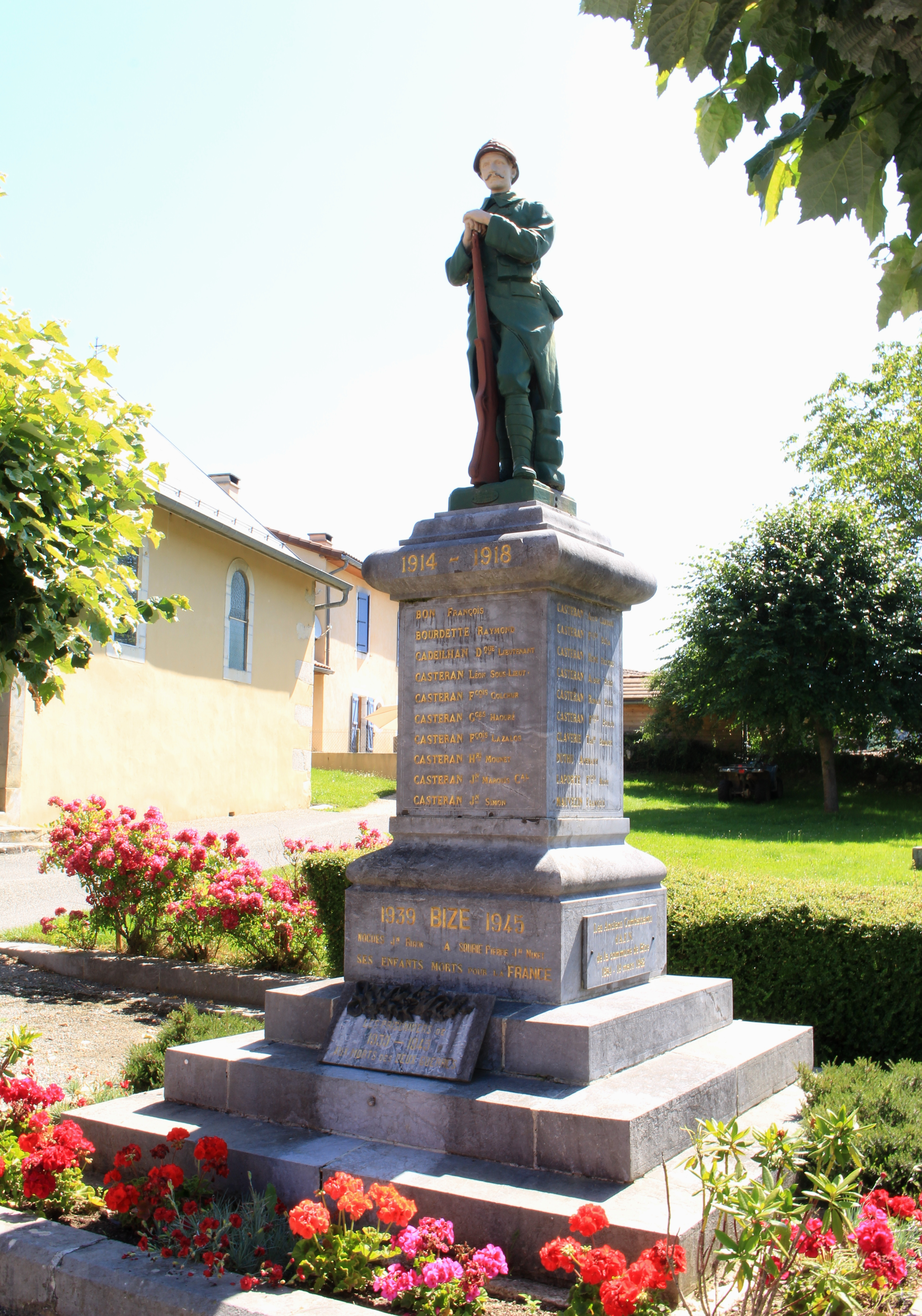 Monument aux morts de Bize (Hautes-Pyrénées)